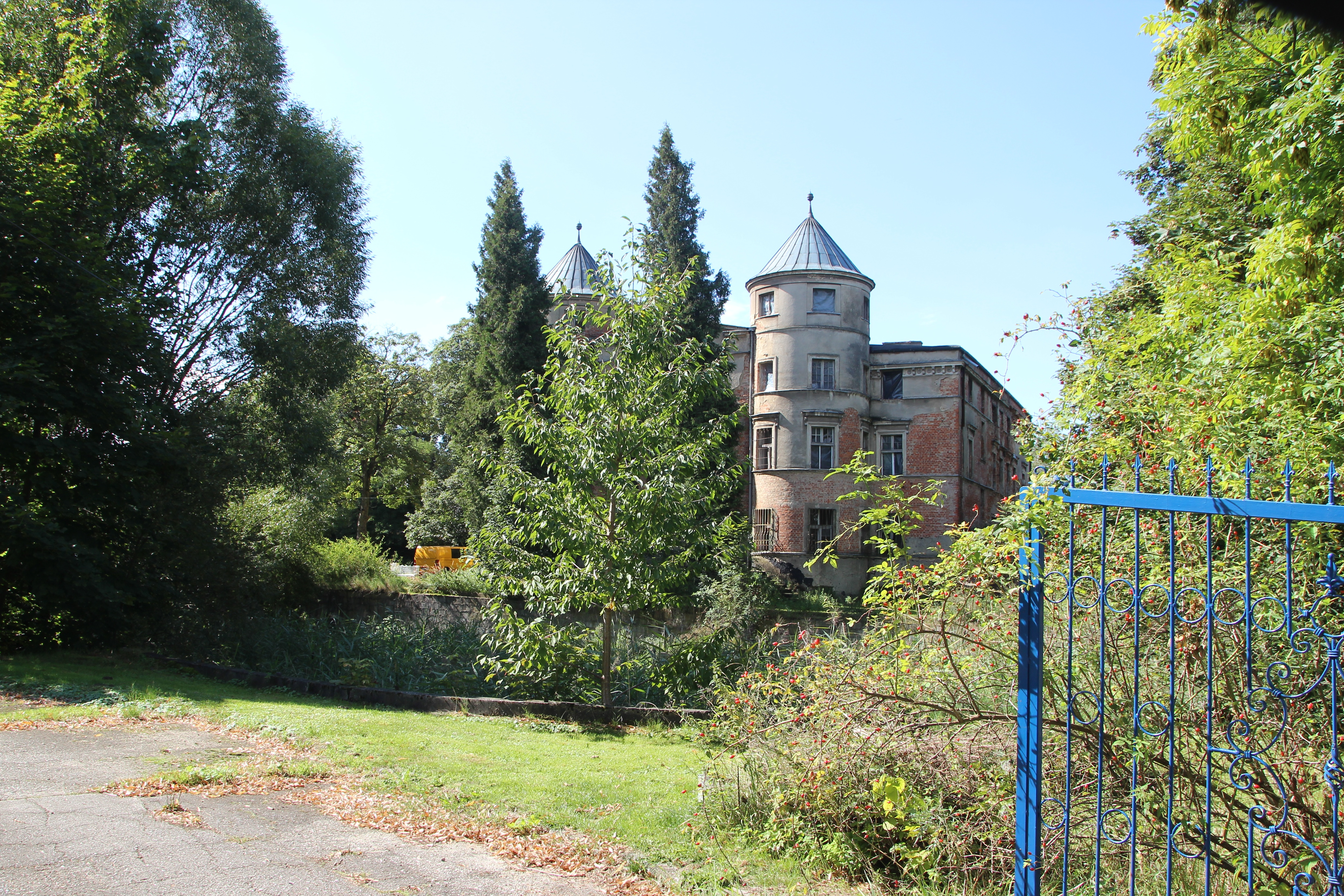 Pałac w Wilemowicach najdujący się w Wilemowicach w województwie opolskim, w powiecie nyskim, w gminie Kamiennik.